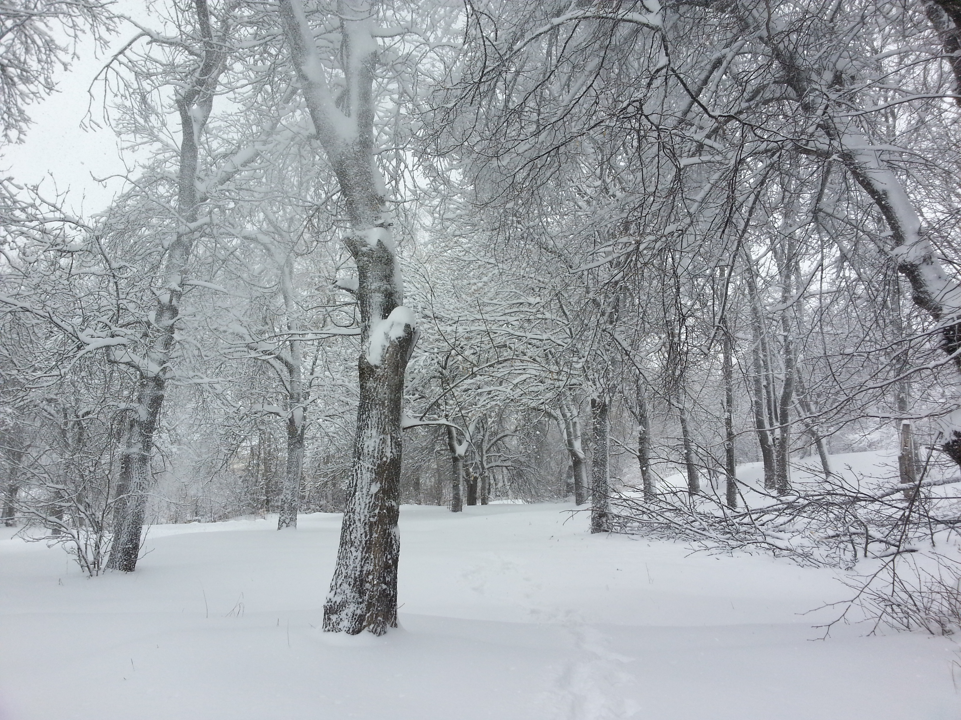 Trees in Tsahkadzor